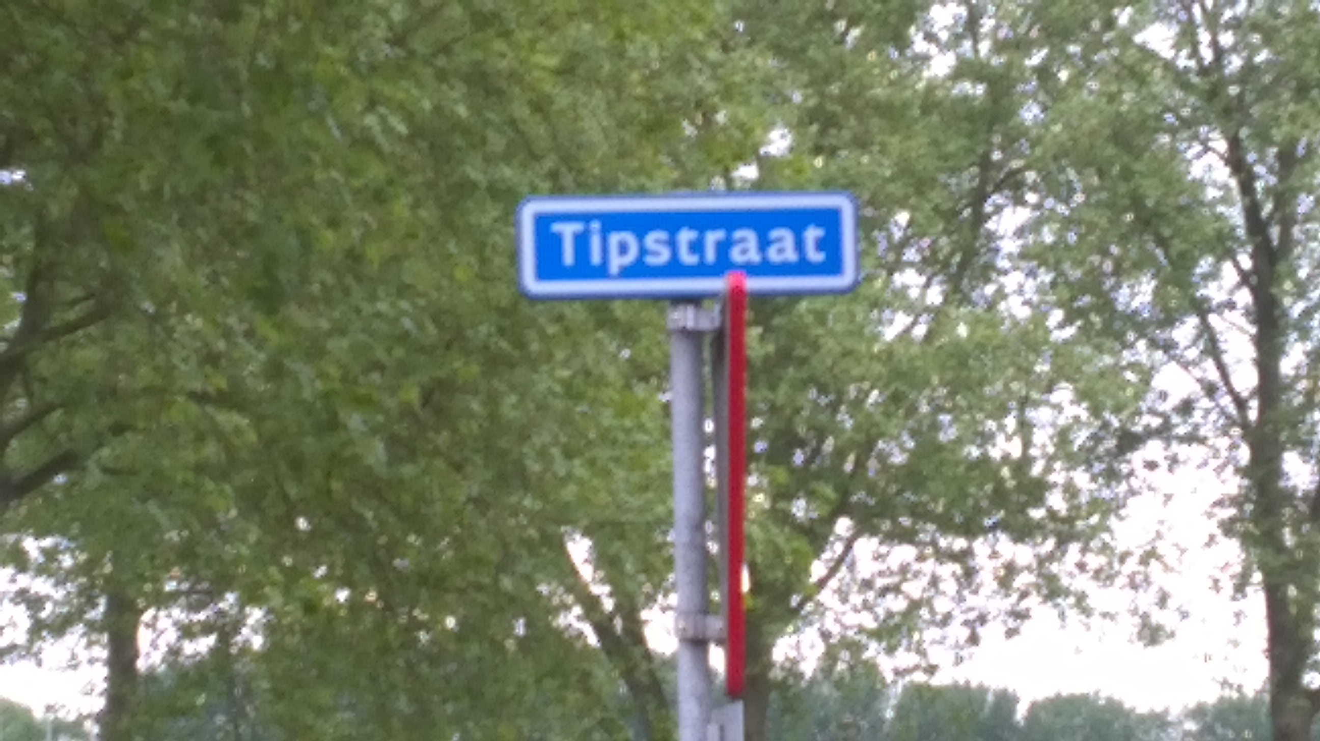 Straatnaambord Tipstraat in Maasbracht. Straatnaambord is blauw met witte letters. Tipstraat slaat op de kolentip die hier in de 20e eeuw stond. Onder het straatnaambord is een verkeersbord 'voorrangsbord'.